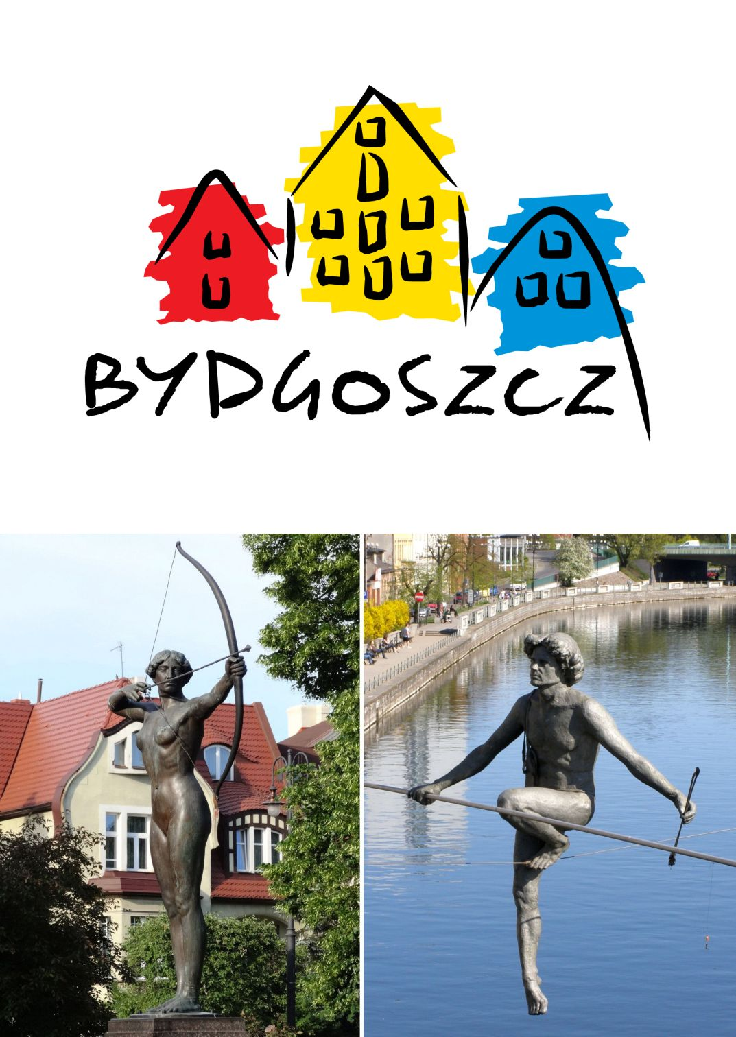 Symbole Bydgoszczy - montaż zdjęć. U góry oficjalny logotyp miasta Bydgoszczy nawiązujący do zbytkowych spichrzy nad Brdą, na dole symbole mniej oficjalne: posąg Łuczniczki oraz Przechodzący przez rzekę